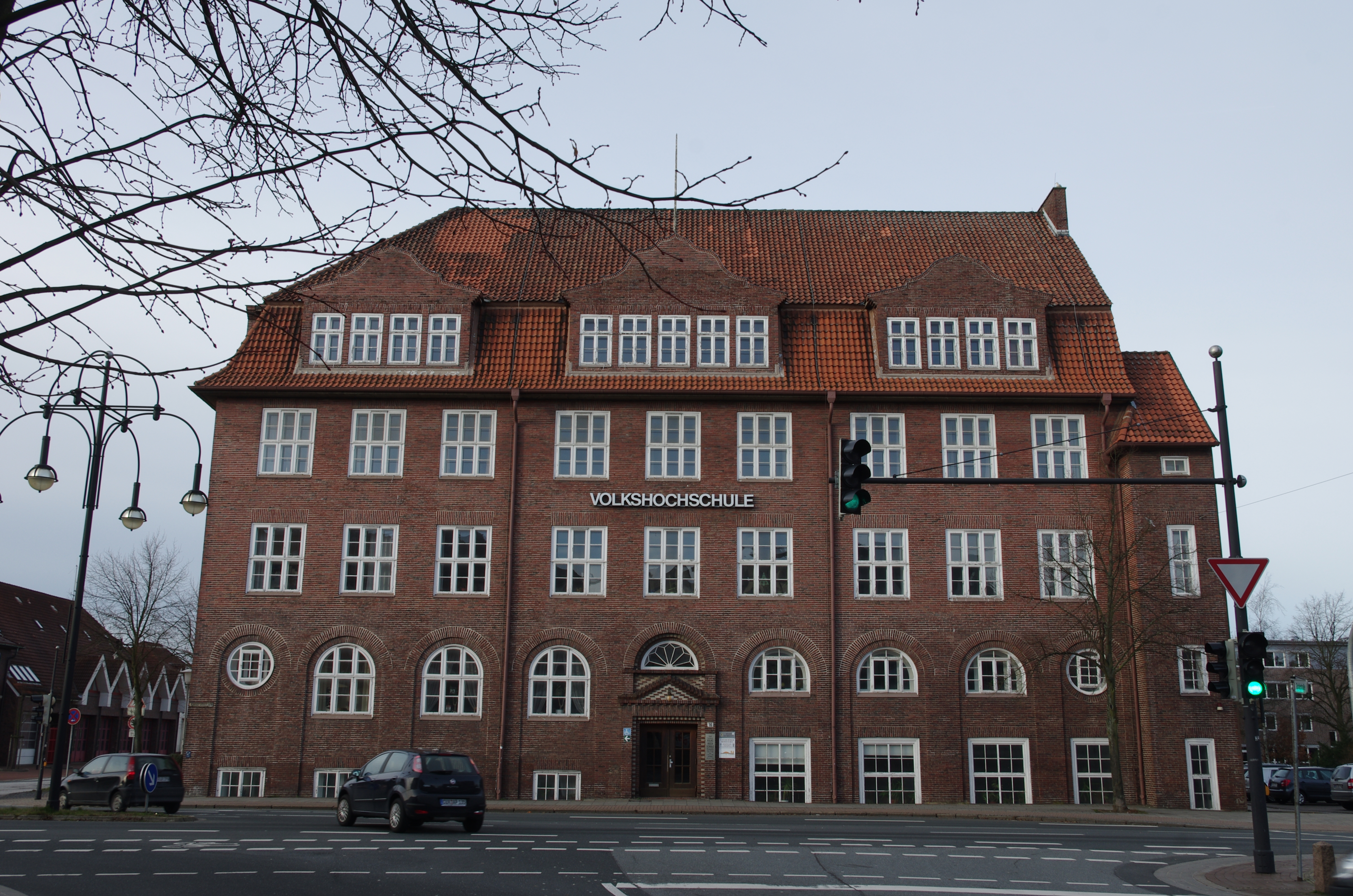 Cuxhaven in Niedersachsen. Das Haus Abenrothstraße ist heute die Volkshochschule und steht unter Denkmalschutz.